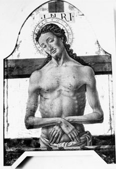 Ecce homo di capua